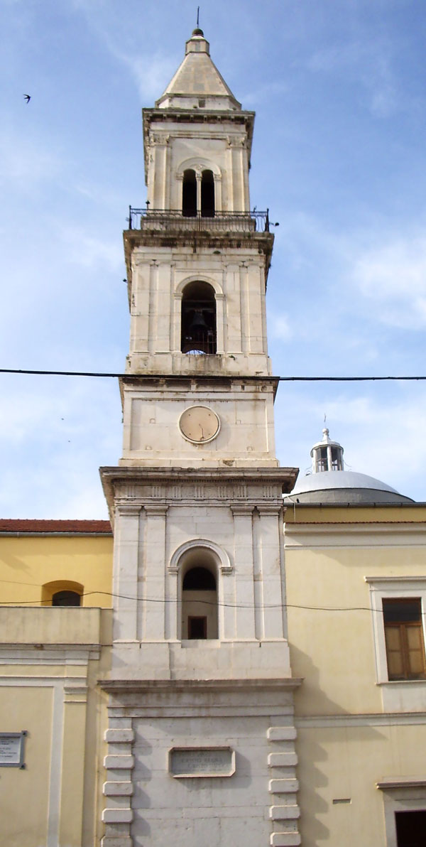 Campanile della Chiesa del Carmine di Cerignola (FG).